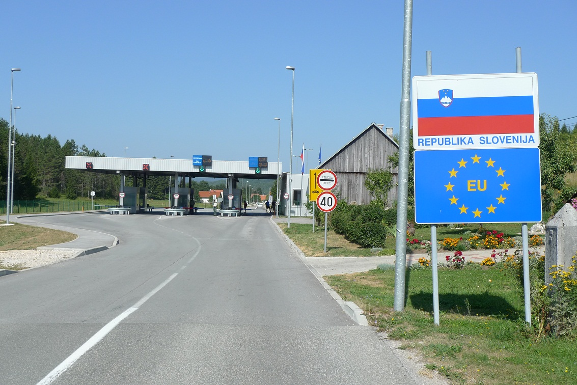 Mejni prehod Babno polje na zunanji Schengenski meji